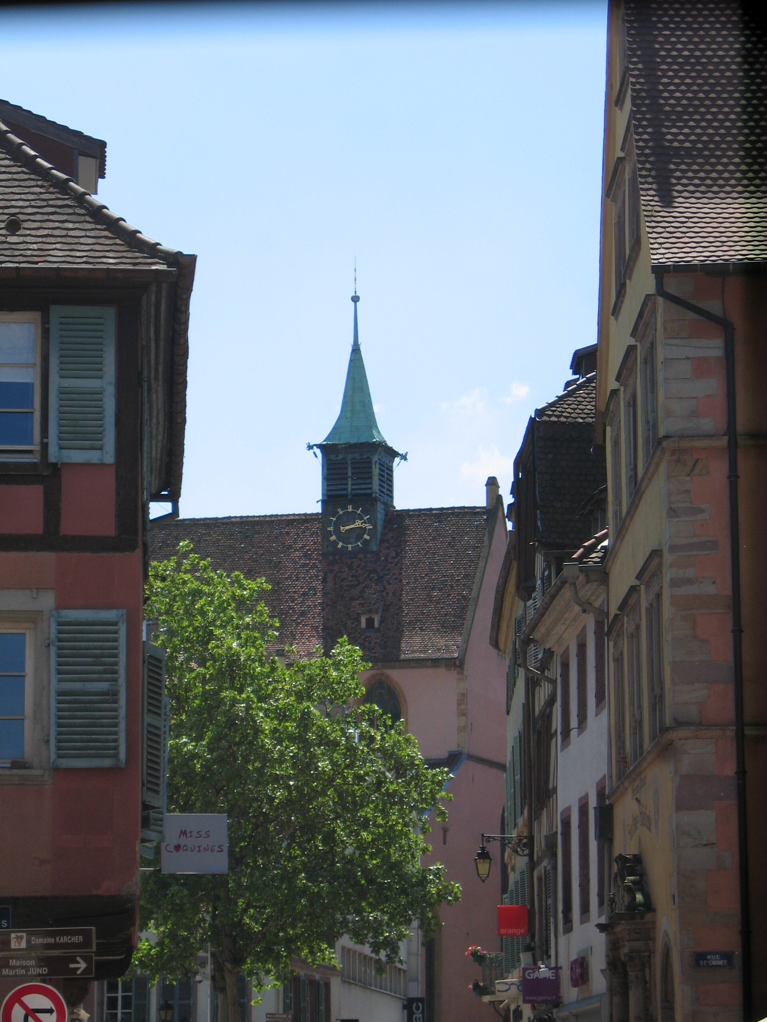 Église Saint Matthieu